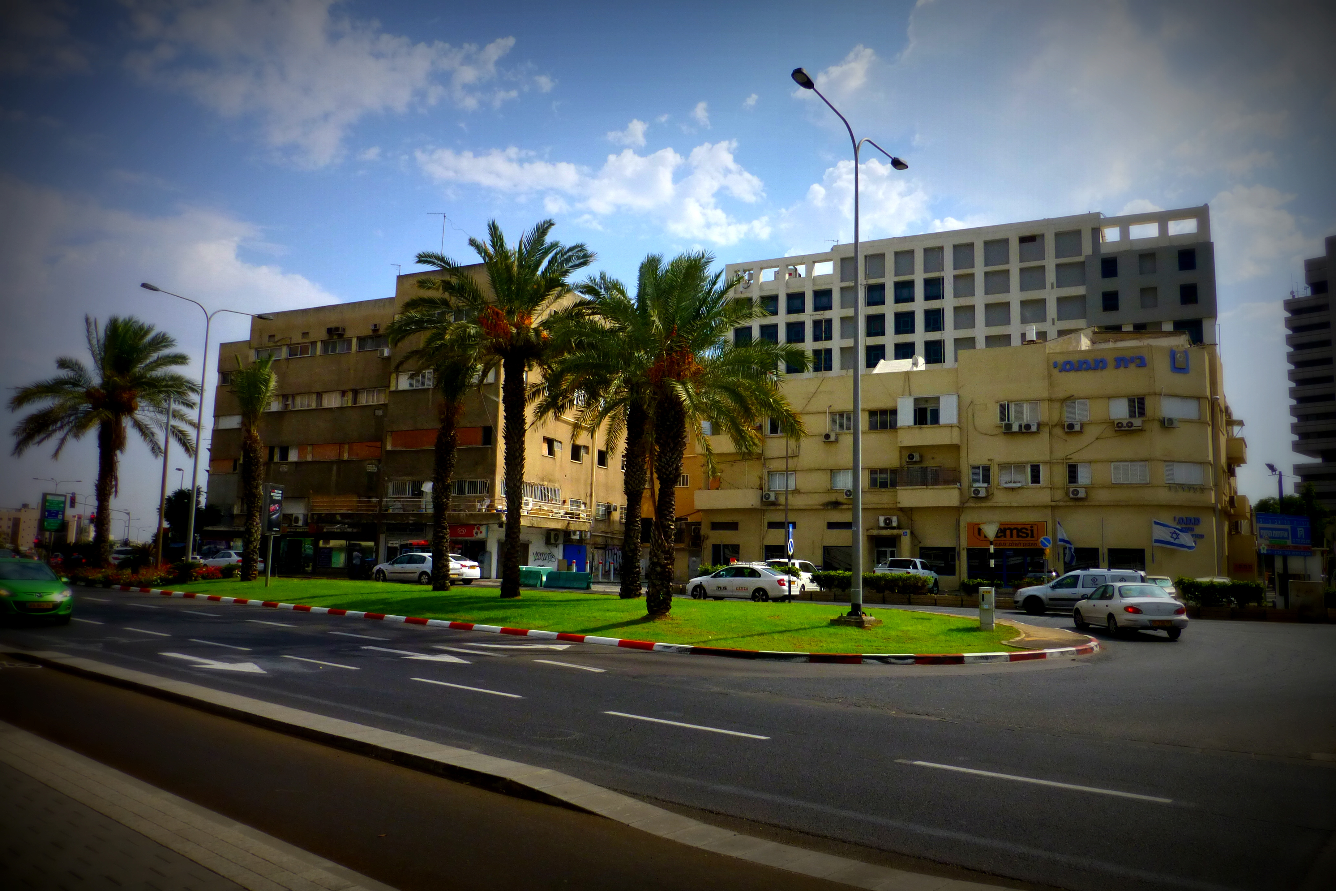 בית הדר הוא בניין המשרדים הראשון שנבנה בתל אביב. הבניין תוכנן ב-1934 על ידי האדריכל קרל רובין והוקם בין השנים 1936 ו-1938. מבנה זה הוא גם הבניין הראשון שנבנה כשלד פלדה, סוג בנייה נדיר יחסית בארץ.